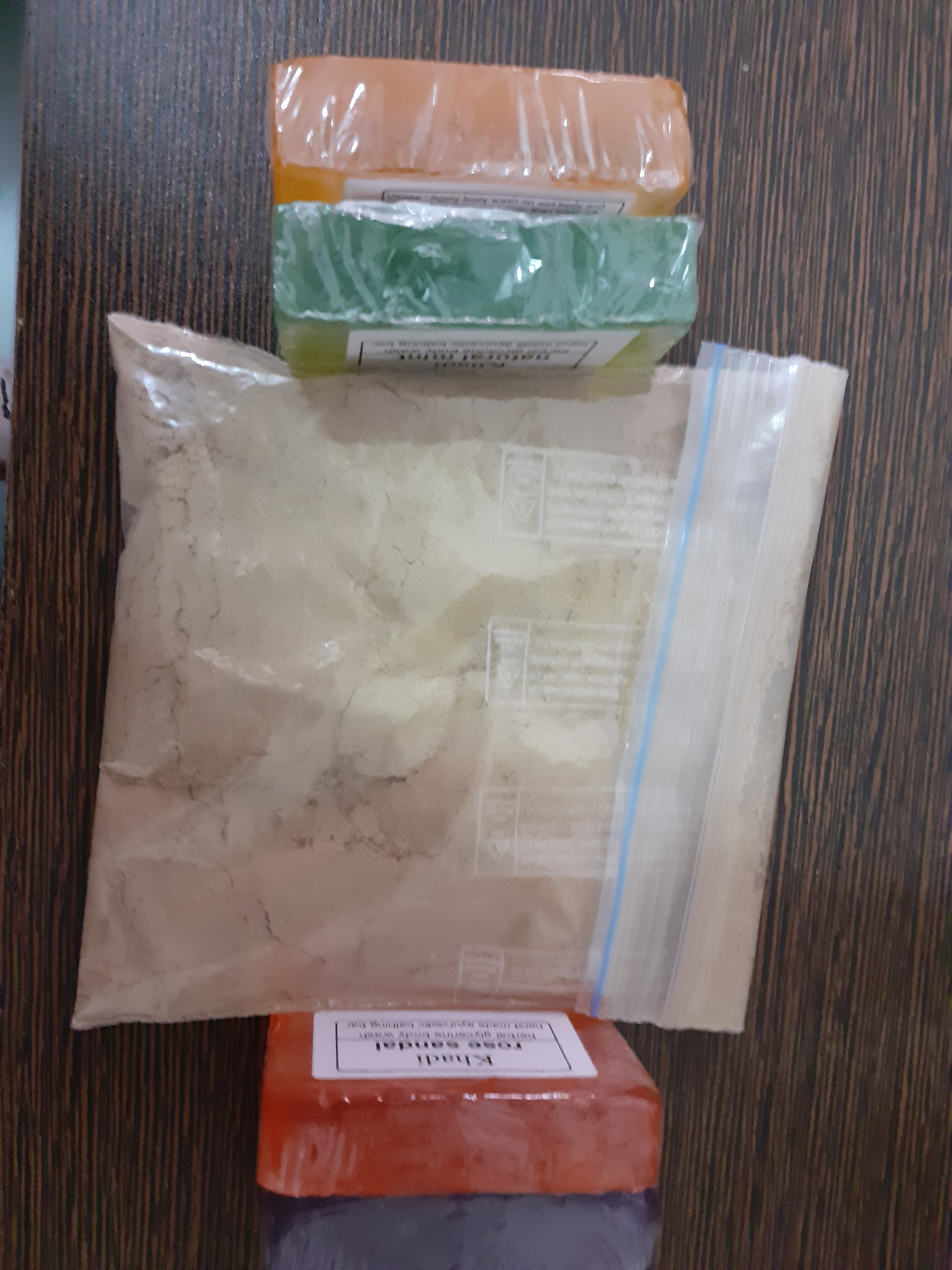 दिवाळीतील अभ्यंग स्नान करण्यासाठी सुगंधी उटणे आणि साबण